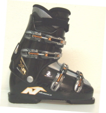 Ski boot